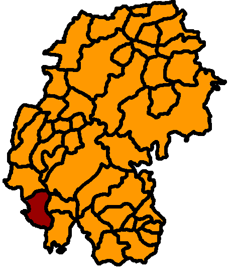 Schmiedefeld am Rennsteig hervorgehoben, Ilm-Kreis